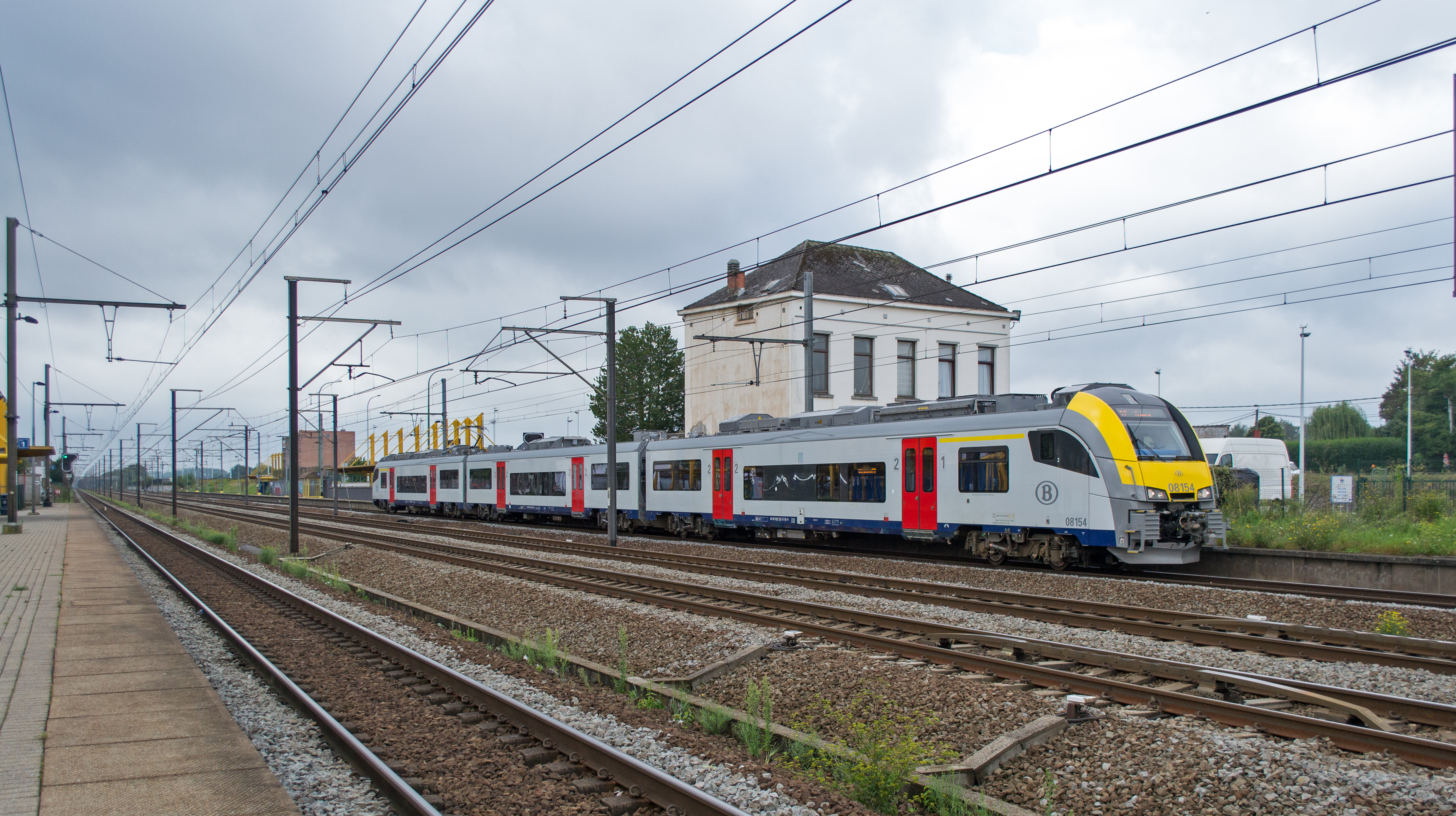 Een aantal opnames uit 2014 die vond uit België.